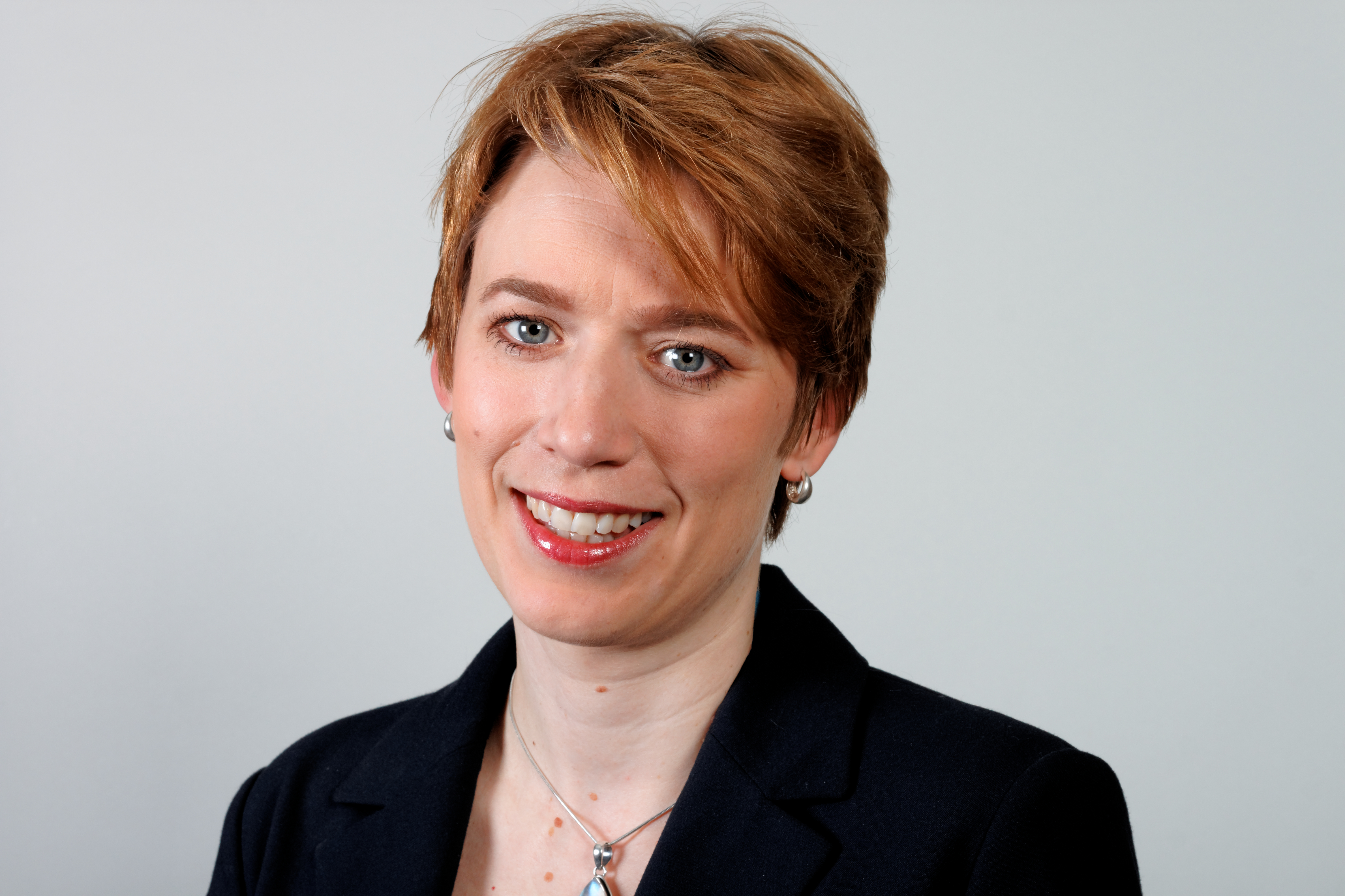 Andrea Lindlohr, Mitglied des Landtages von Baden-Württemberg